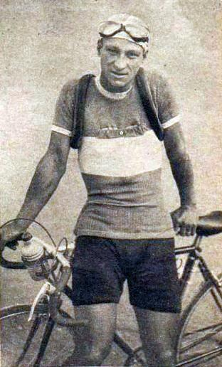 Gabriel Gaudin en juin 1943 (winner of Paris-Nantes and Paris-Tours same year).